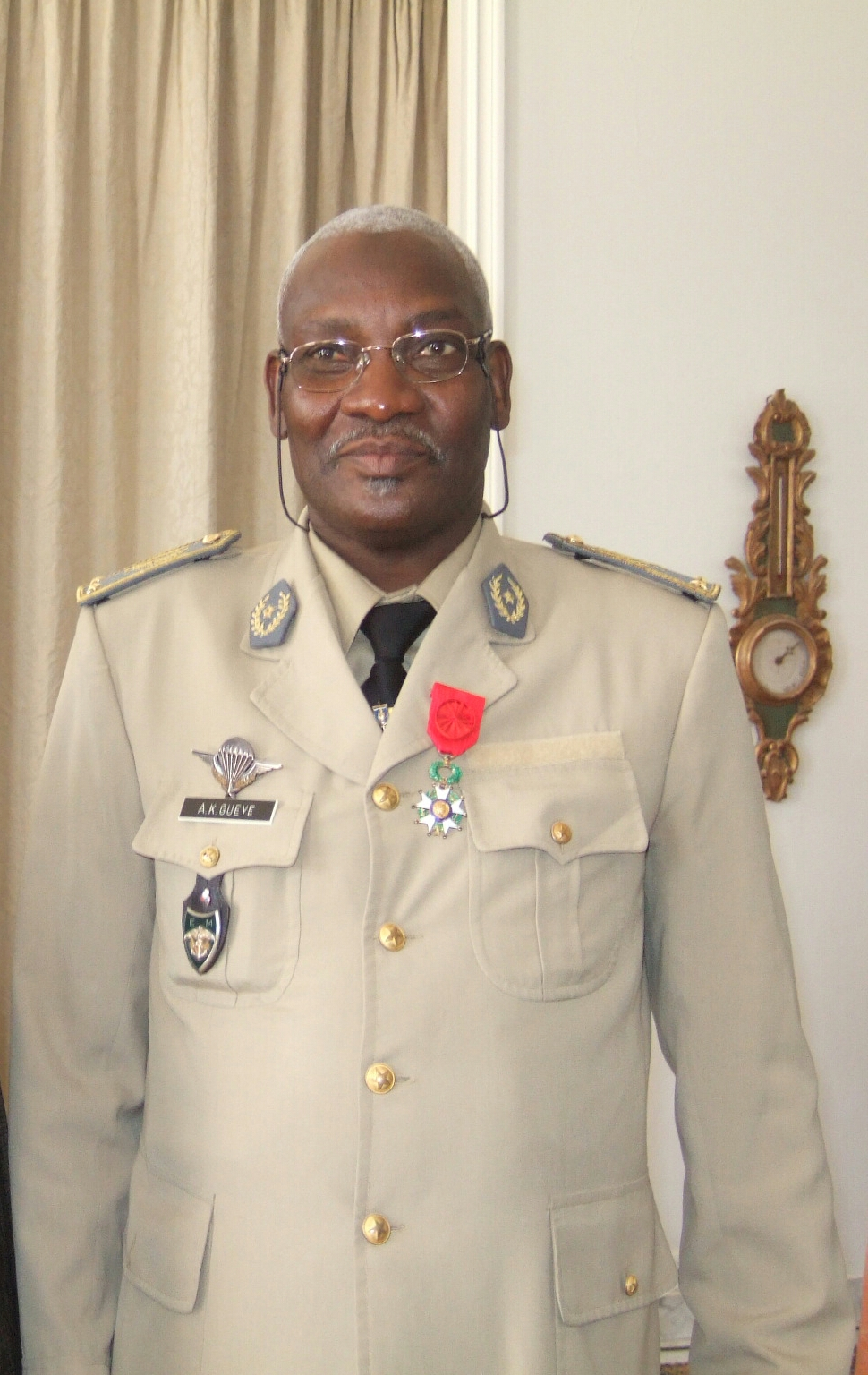 Réception Légion d'Honneur